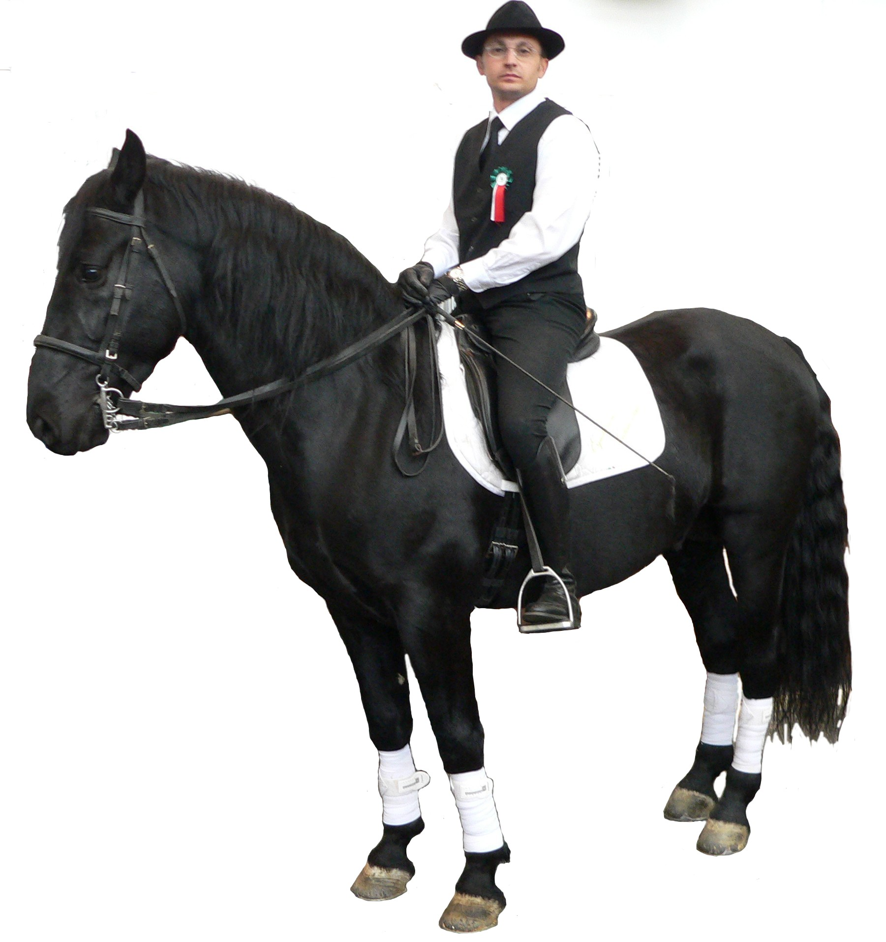 Murgese - Italian horce race, 02. March 2005, as presented on the german horsefair "Equitana"